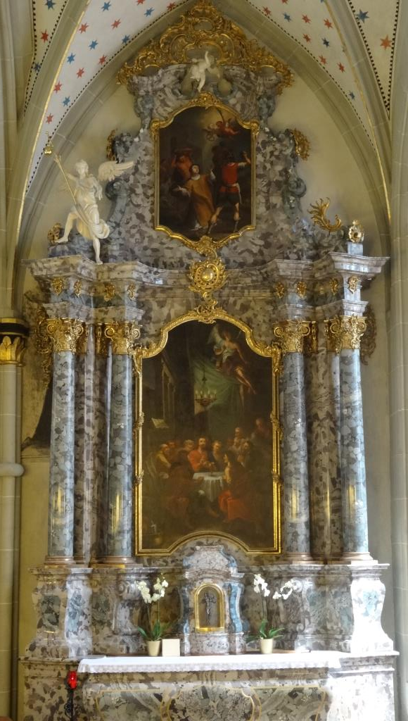 Cathédrale St-Nicolas de Fribourg (Suisse). Autel latéral de la Sainte-Cène (Saint-Sacrement).